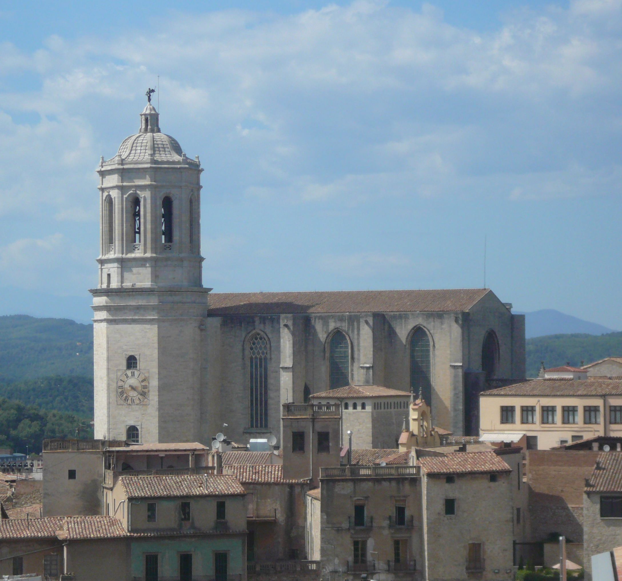 Catedral de Santa Maria (Girona)